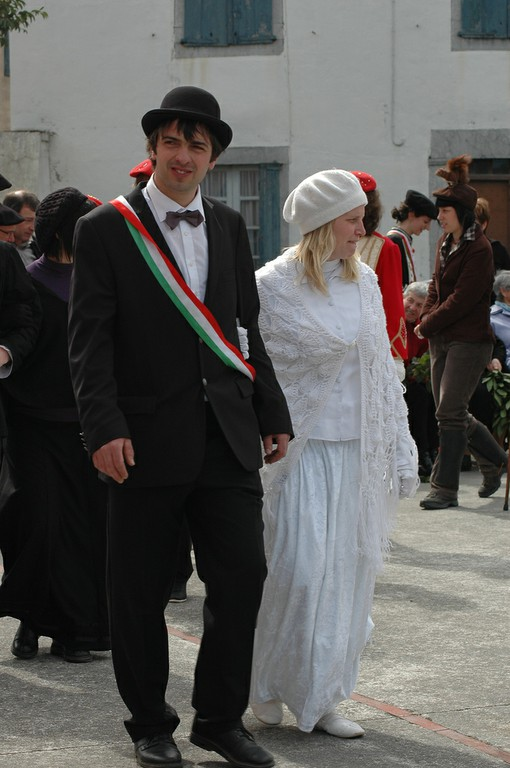 Larraineko gazteek eman zituzten maskaradak 2010ean, eta irudietan Barkoxera egindako bisitan ageri dira. 2010-03-27. Irudian Jauna eta anderea.